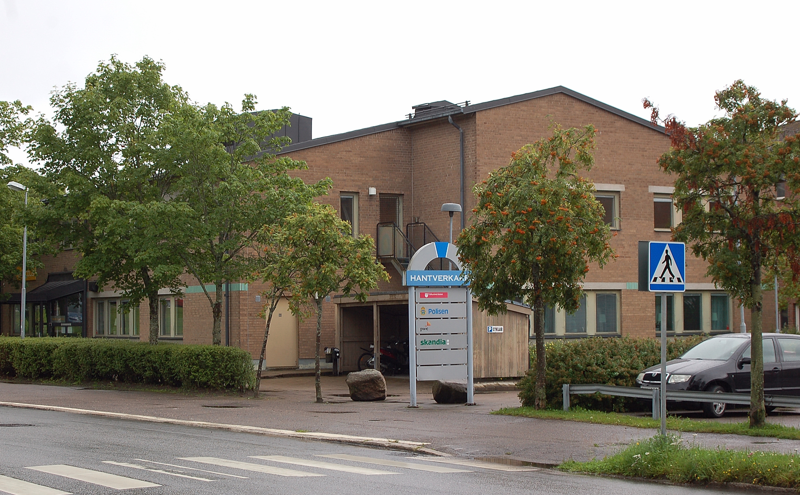 Karlskoga Tingshus. Byggnadsår 1985. Bengt Linnman (Arkitekt), BPA Byggproduktion AB (Byggmästare)